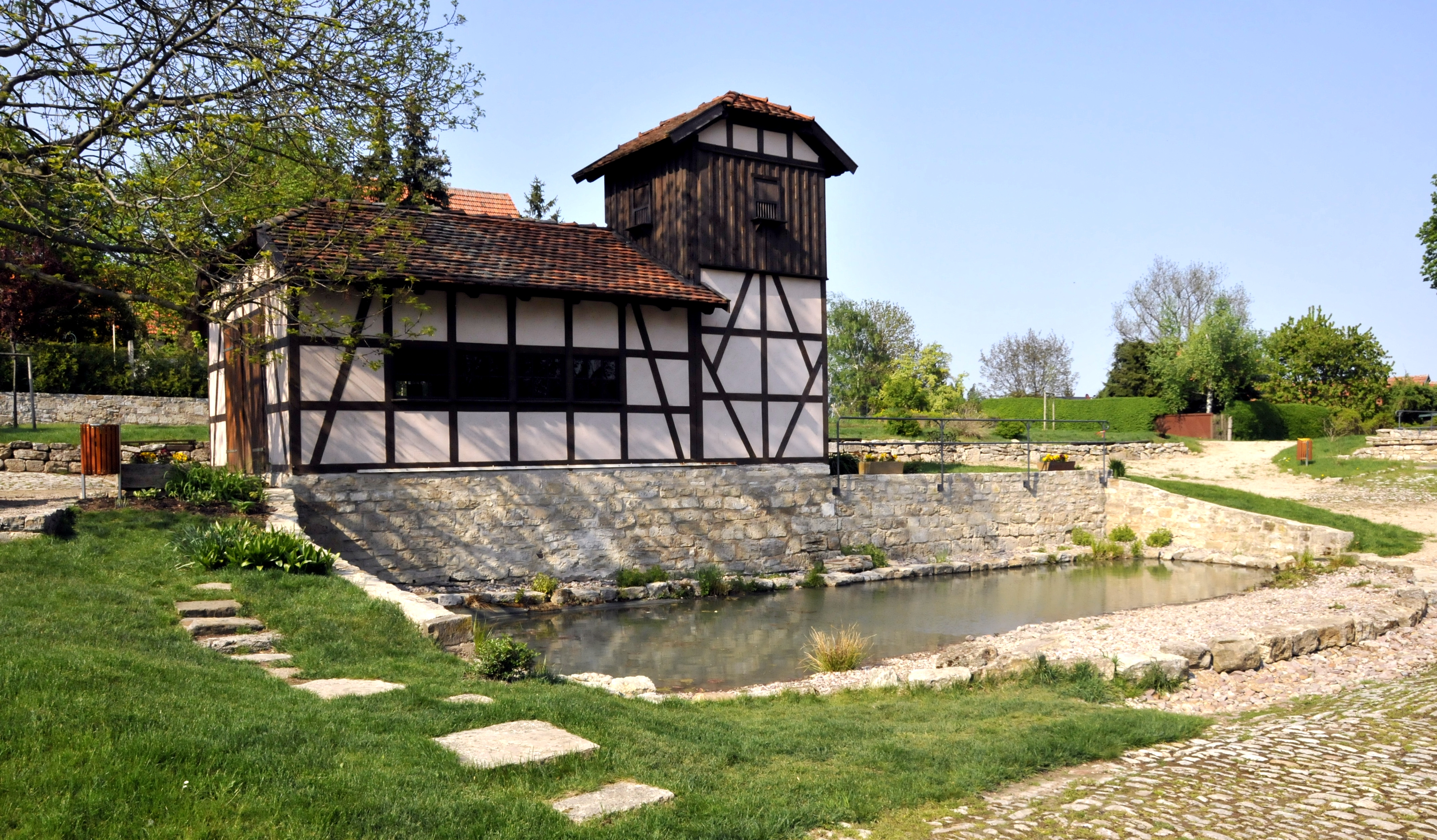 Ballstädt, Parkanlage am alten Rittergut